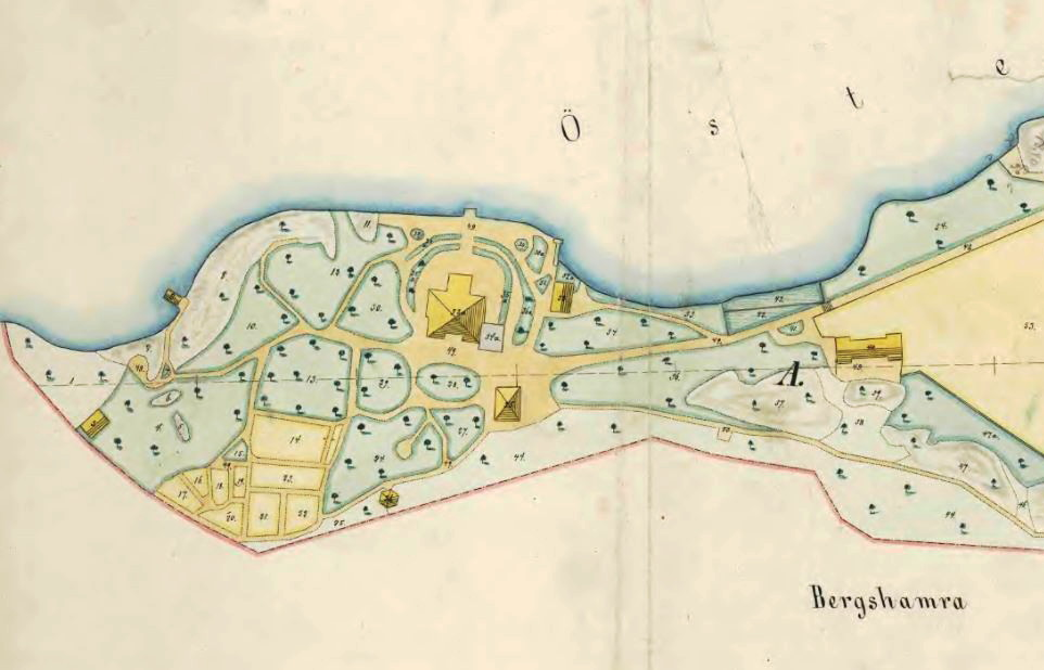 Karta över Björkhagen, Stocksundstorp